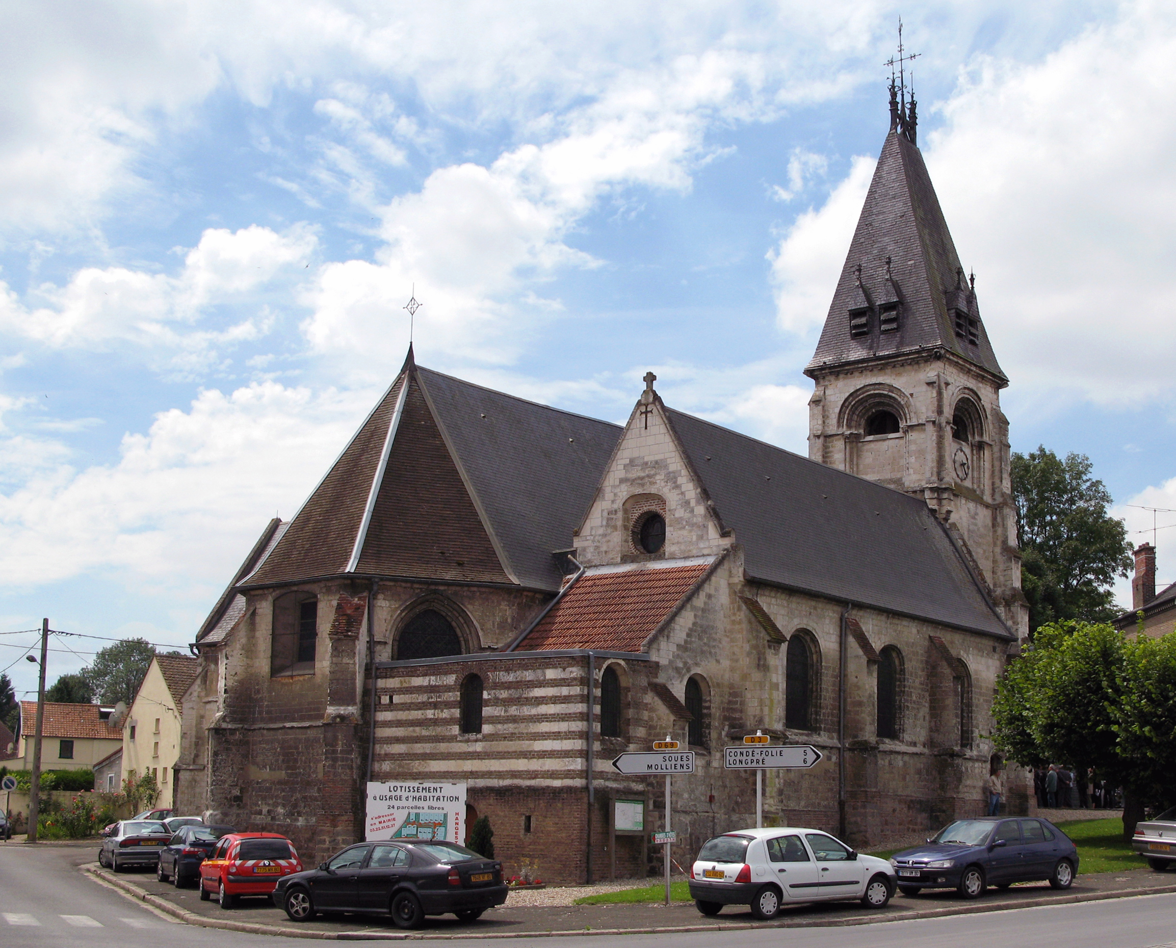 Hangest-sur-Somme (Somme, France) - L'église. .